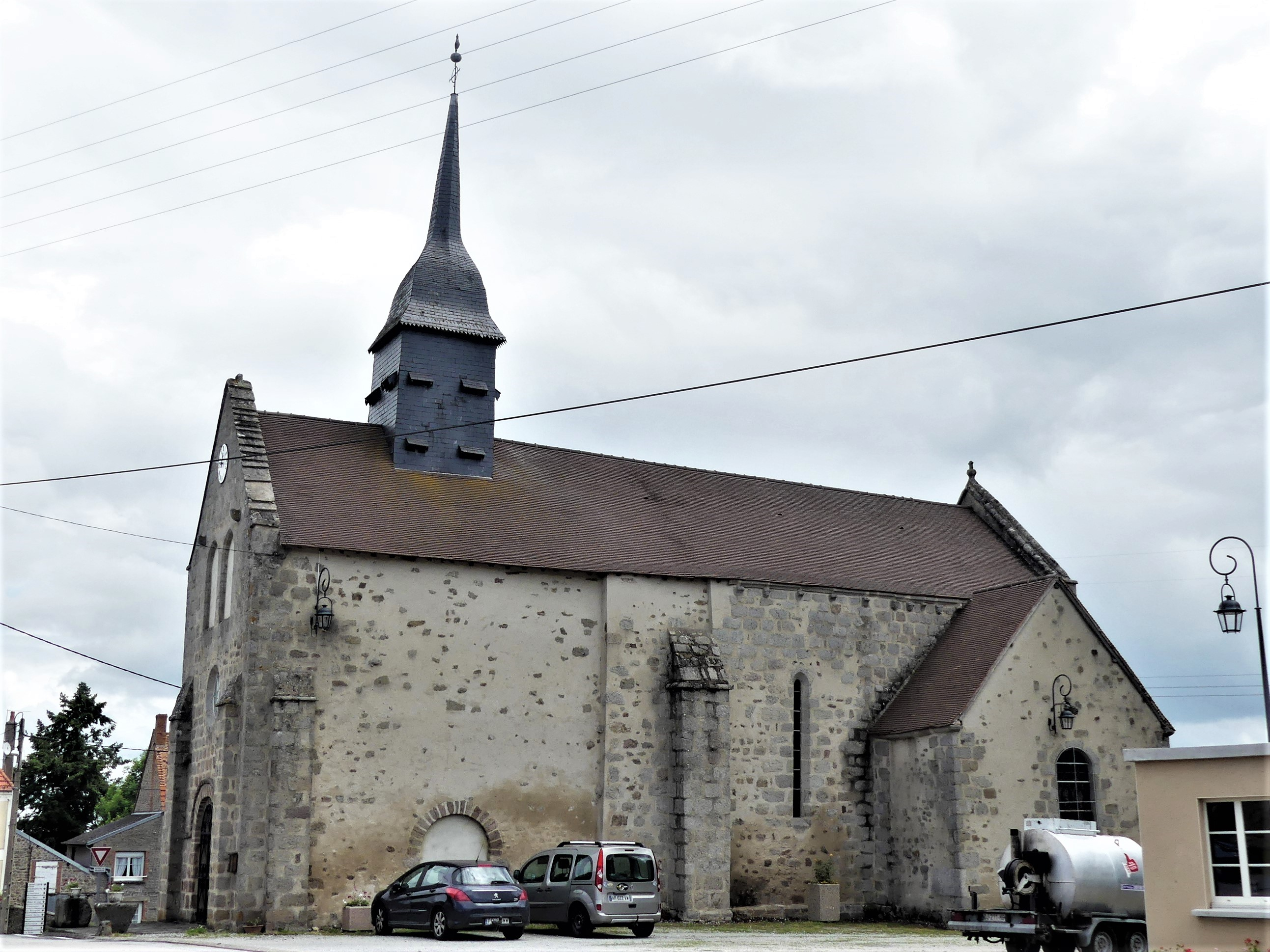 L'église de Saint-Chabrais, Creuse, France.